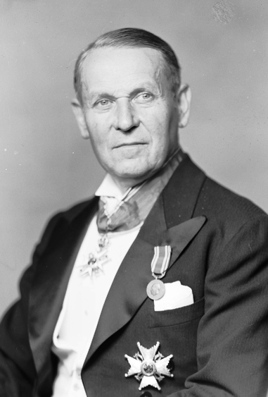 portrett, mann, skipsreder, brystbilde, ordener.